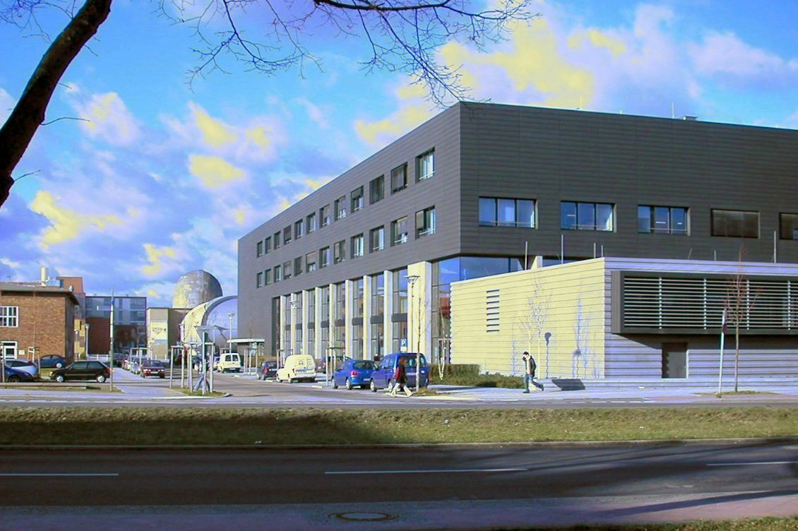 Erwin Schrödinger-Zentrum Adlershof - Universitätsbibliothek der Humboldt-Universität zu Berlin, Zweigbibliothek Naturwissenschaften (rechts) hinten links die Institutsgebäude der Chemie der Humboldt-Universität mittig hinter der Biblio der historische Windkanal (denkmalgeschützt)